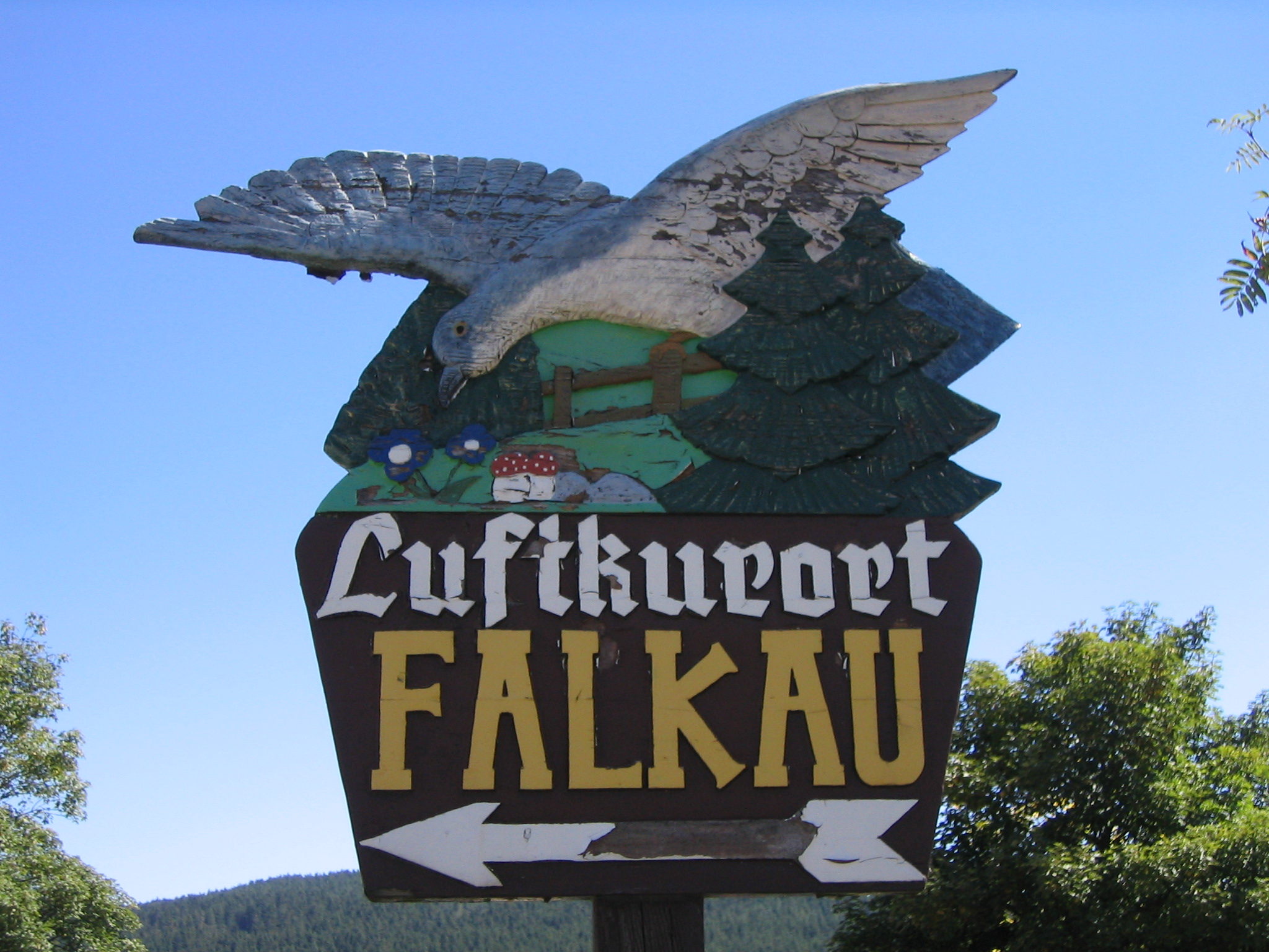 Wegweiser zum Ortsteil Falkau